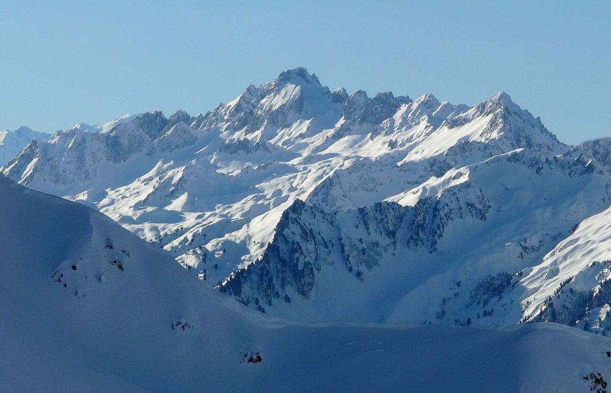 Grand pic de la Lauzière depuis les hauteurs de la Léchère, vue nord.